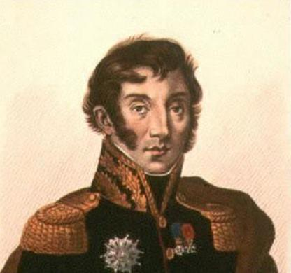 Der Französische General Jean Maximilien Lamarque (1770-1832)